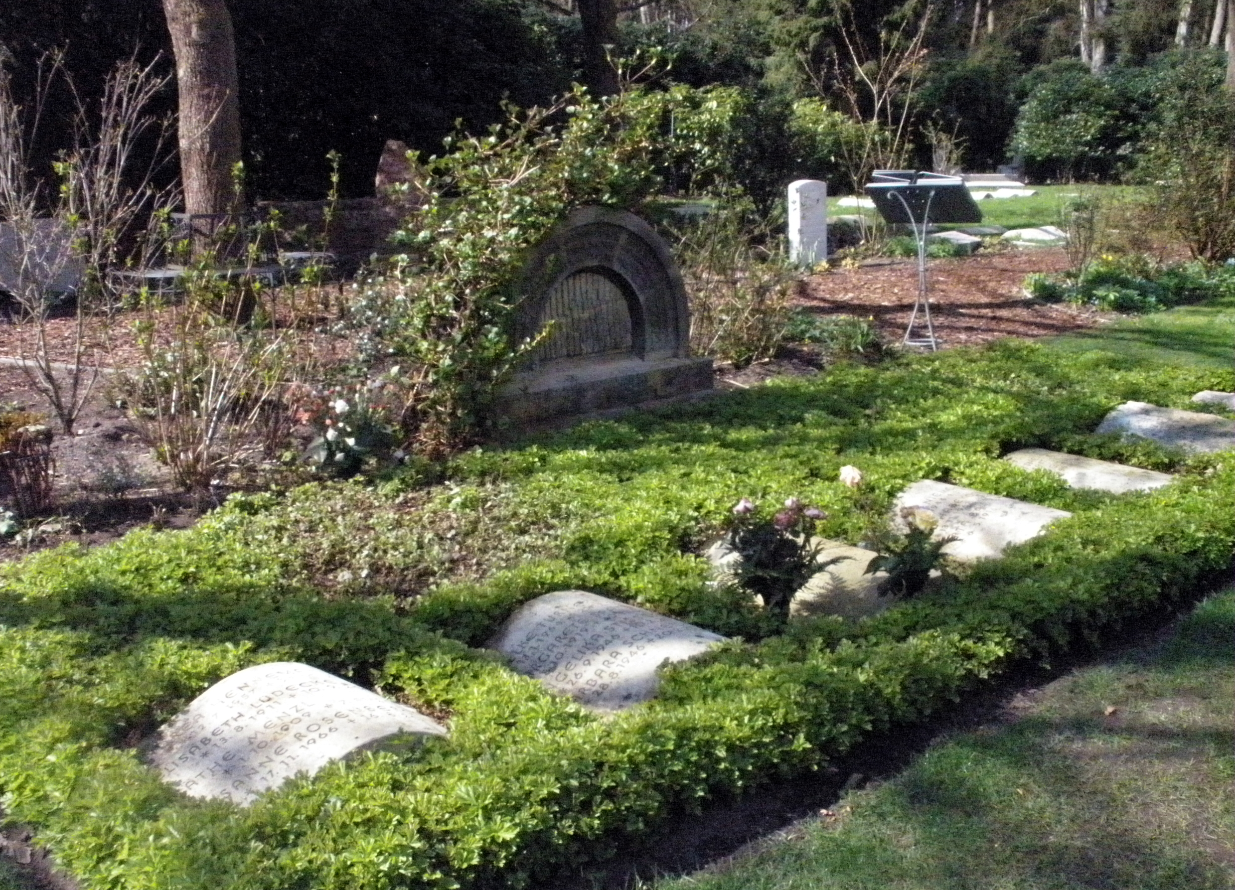 garten der frauen friedhof ohlsdorf